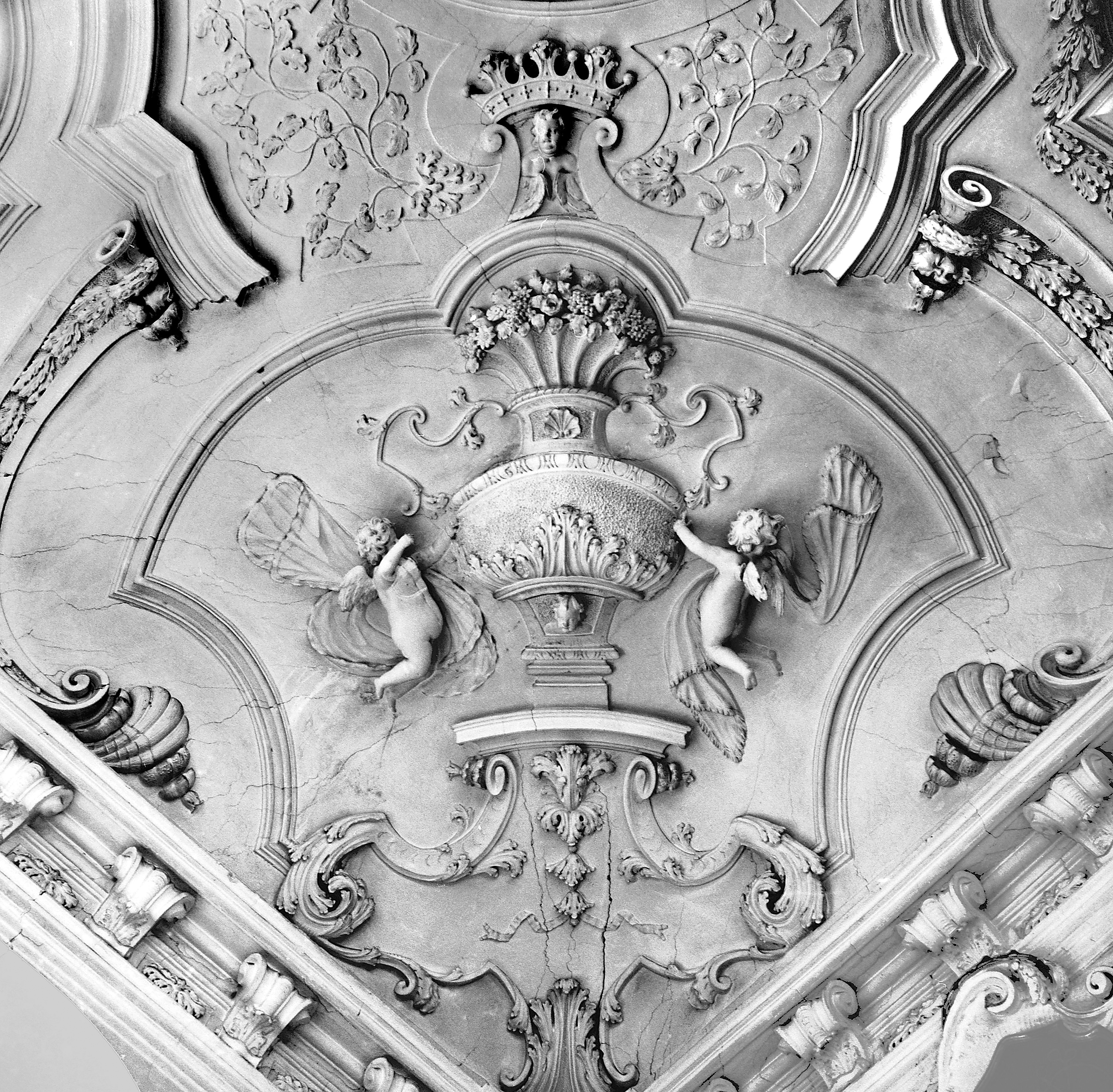 24.09.1987 2561 [18239] Hohen Luckow (Satow): Herrenhaus (GMP: 53.983689,11.961824), erbaut 1707-1708 unter Christoph von Bassewitz. In der DDR Volkseigenes Gut. Stuckdecke im Rittersaal im OG. Vermutl. von italien. Künstlern inder Erbauungszeit geschaffen. [R19870924B01.jpg]19870924580NR.JPG(c)Blobelt